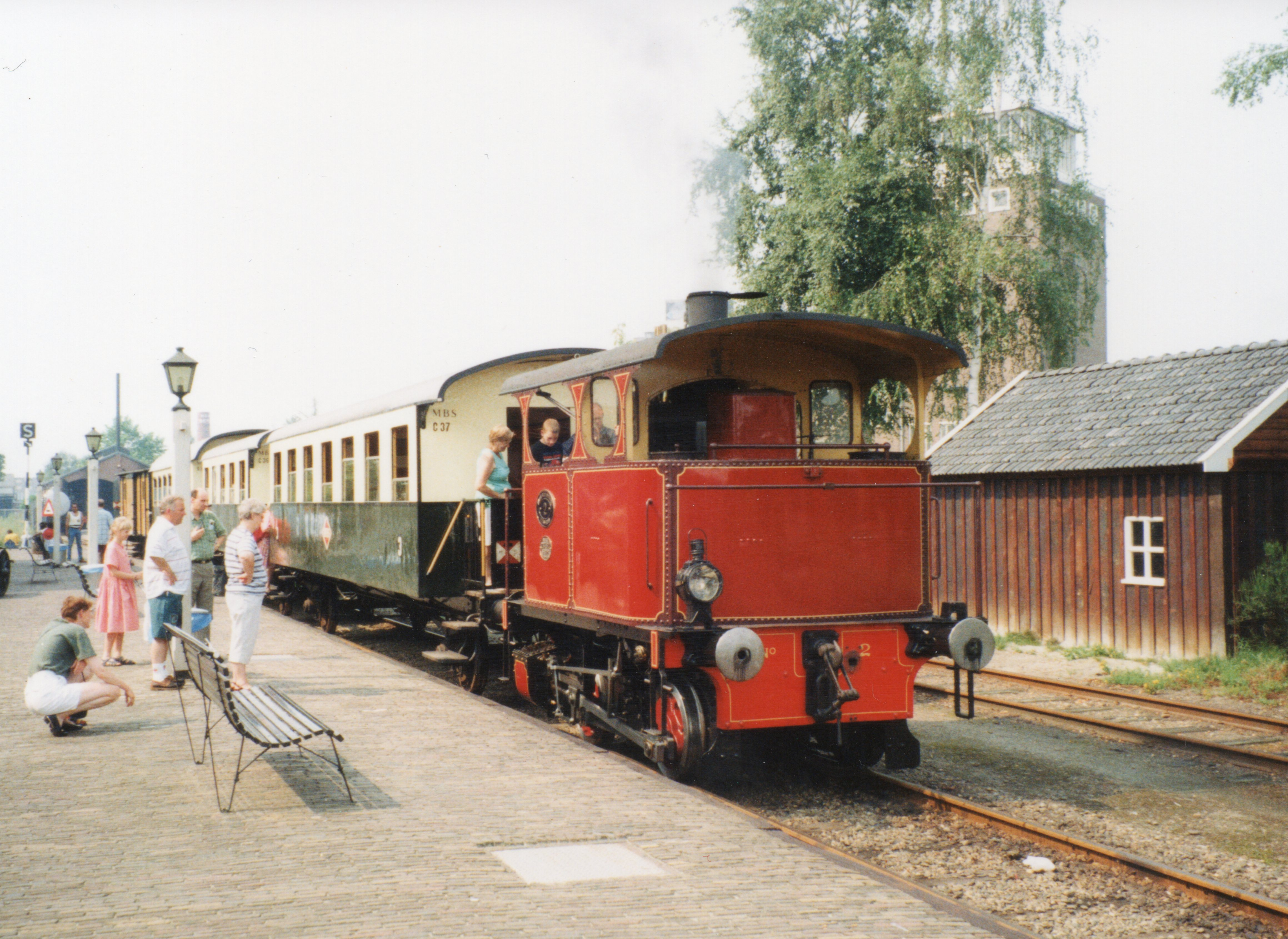 Museum Buurtspoorweg Cockerill-locomotief 2 in de eerdere rode kleur.